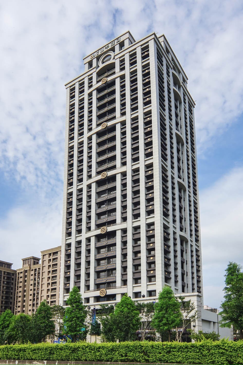 八德區最高建築-新潤御丰莊園